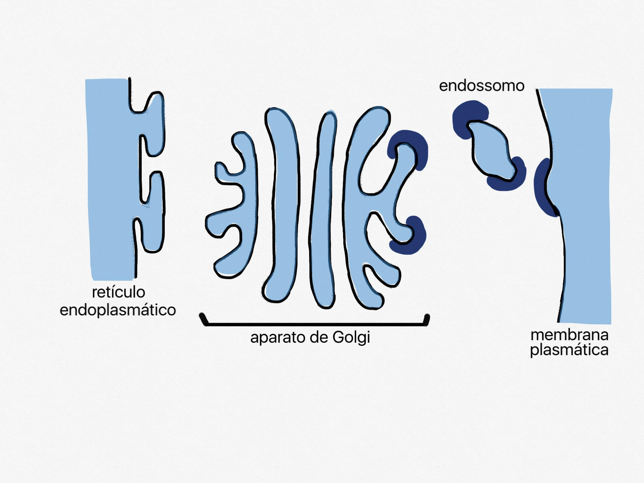 As vesículas revestidas de clatrina brotam da face trans do aparato de Golgi, dos endossomos e da membrana plasmática.